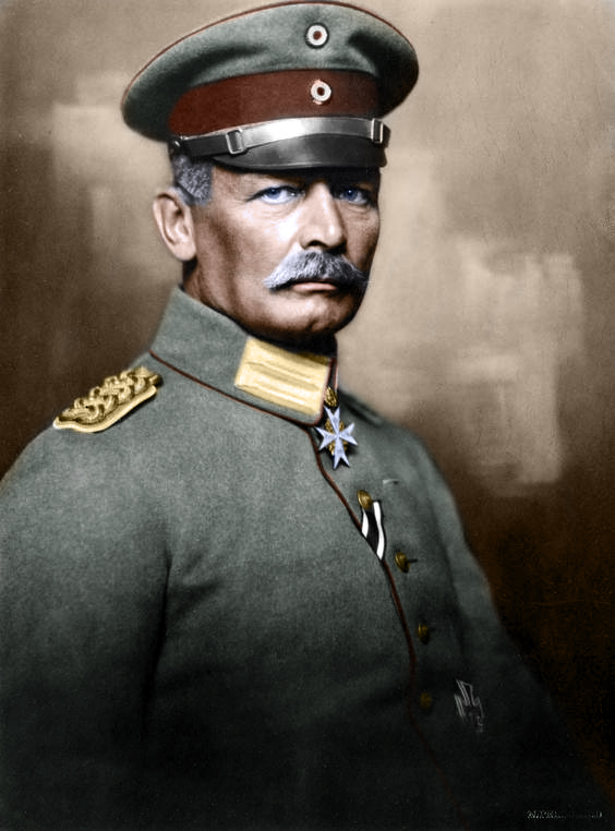 Ich habe Erich von Falkenhayn "neu eingefärbt"